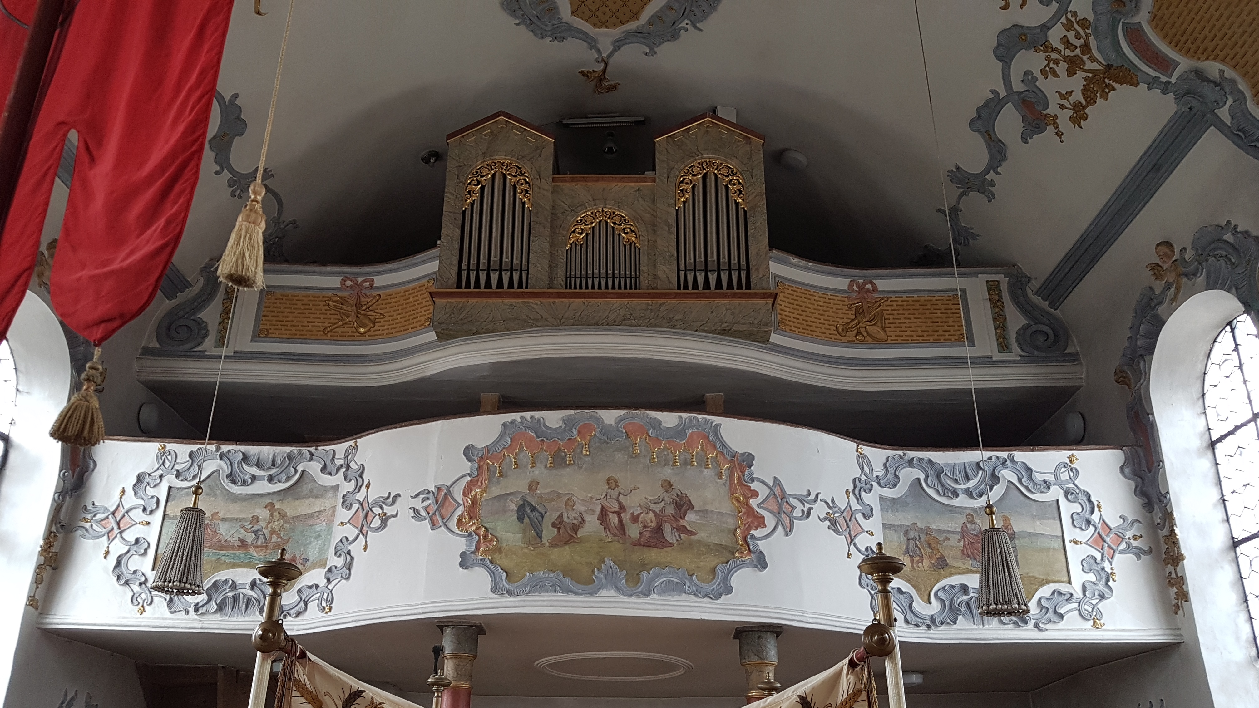 Oberfinning (Gmde Finning), Pfarrkirche Hl. Kreuz, Empore mit der Orgel.